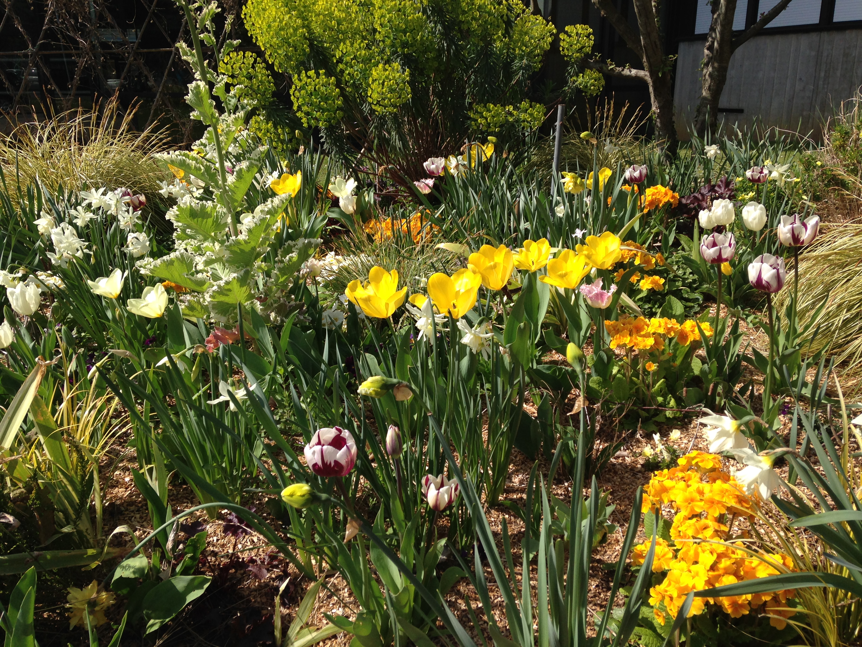 Aménagement végétal à l'Agrocampus Ouest d'Angers (Maine-et-Loire, France), spécialisé en horticulture et en paysage.